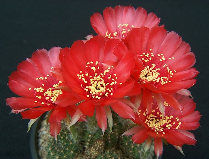 Echinopsis ancistrophora subsp. densiseta